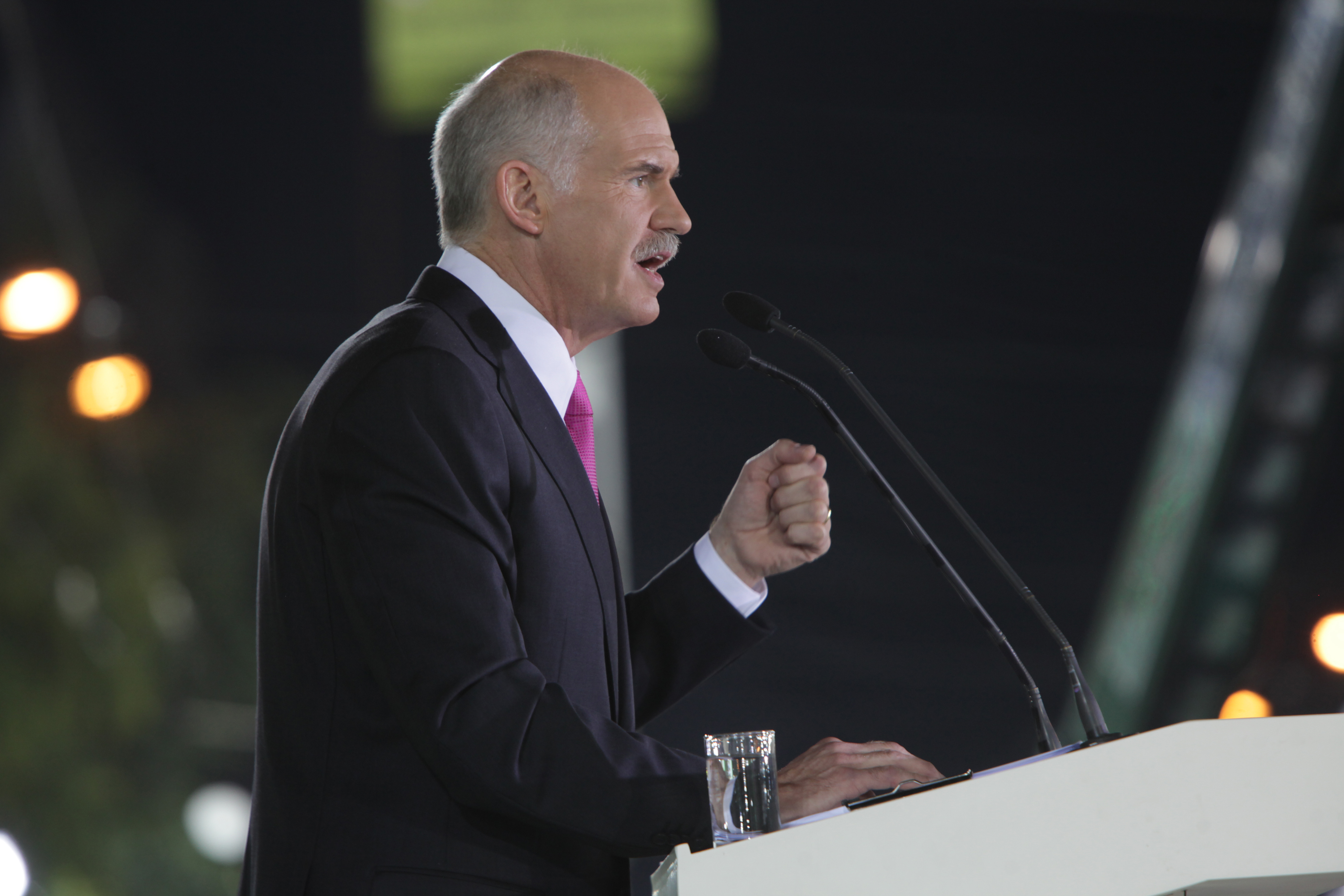 Ομιλία Γιώργου Α. Παπανδρέου | Αθήνα